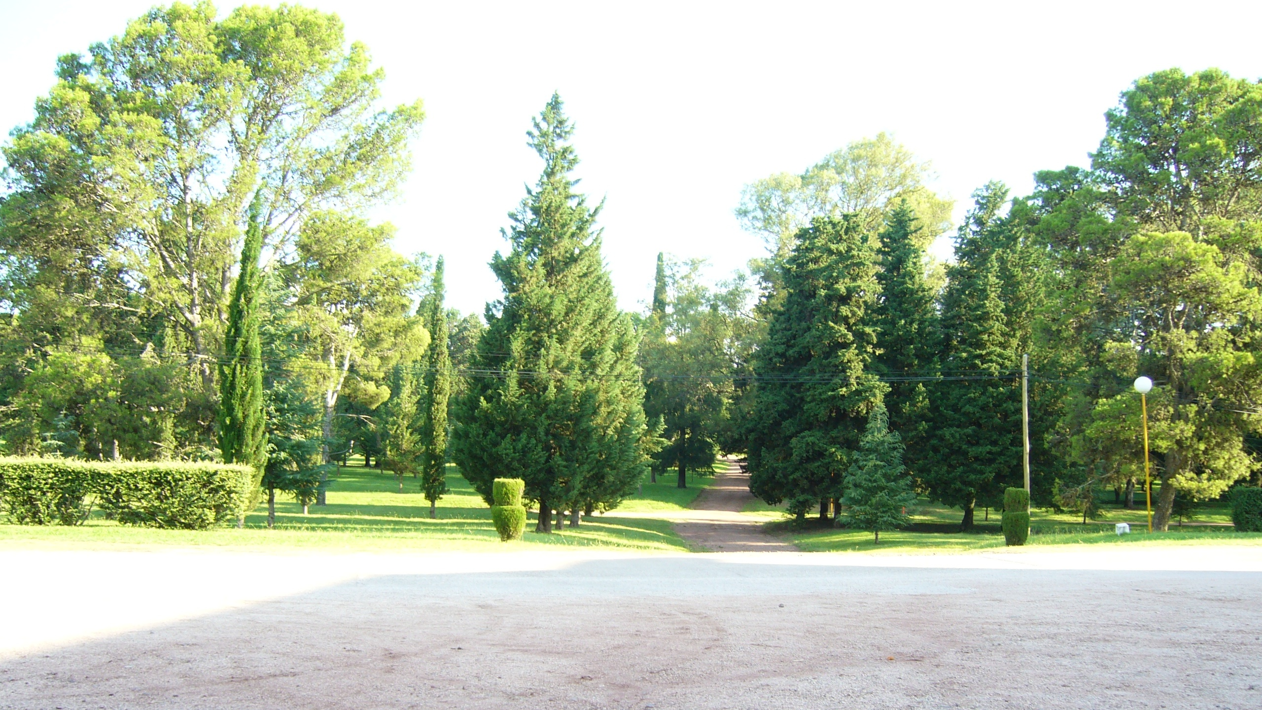 Vista parcial del parque detrás del Hotel N˚ 2 en 2009 Unidad Turística Embalse Córdoba Argentina